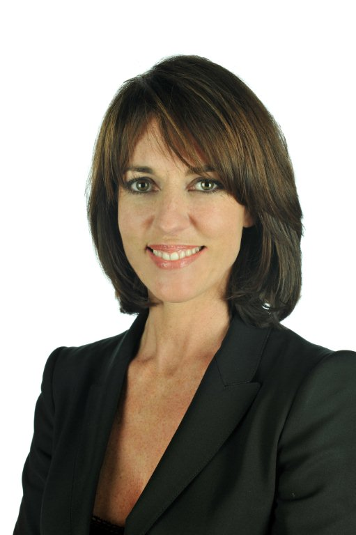 Laurence Arribagé